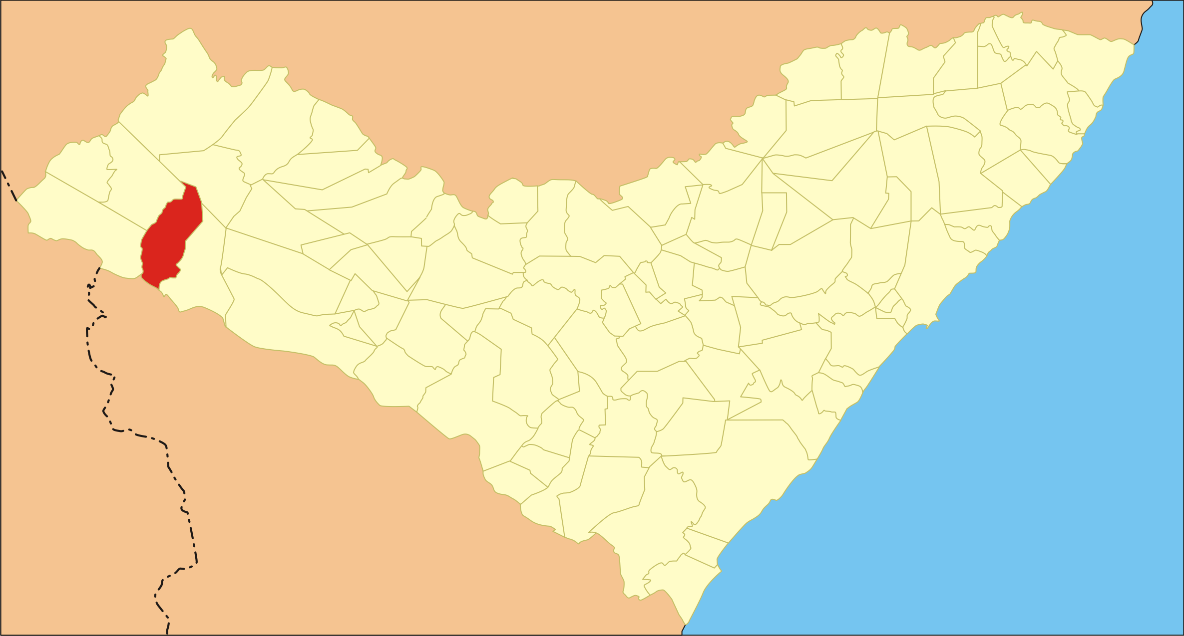 Localização da cidade no estado de Alagoas.